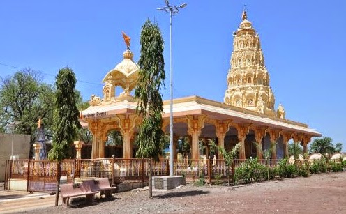 भैरवनाथ मंदिर पाबळ